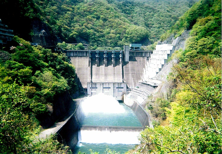 Dam